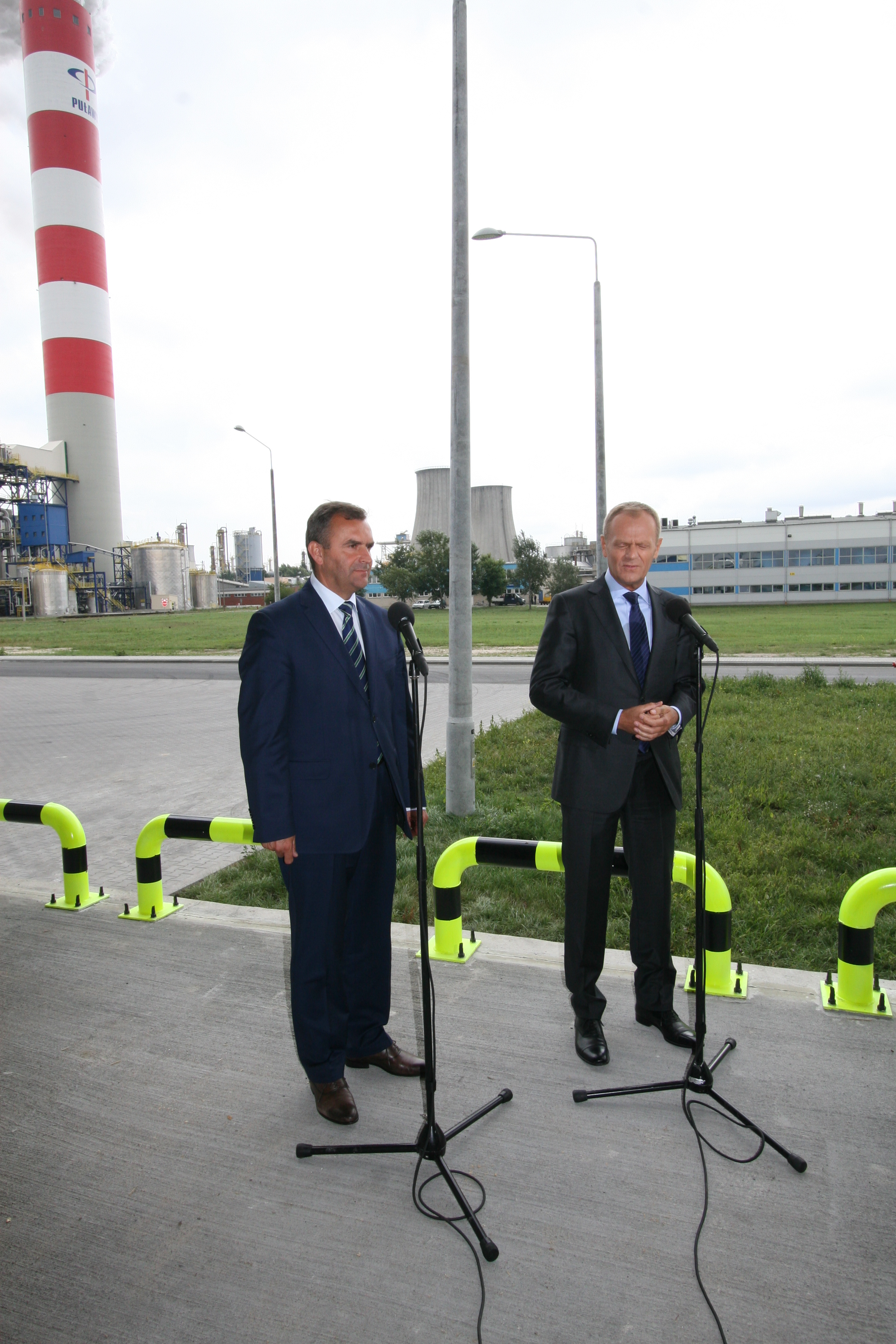 Wizyta premiera RP - Donalda Tuska i ministra Skarbu Państwa - Włodzimierza Karpińskiego w Grupie Azoty Zakładach Azotowych "Puławy" S.A.